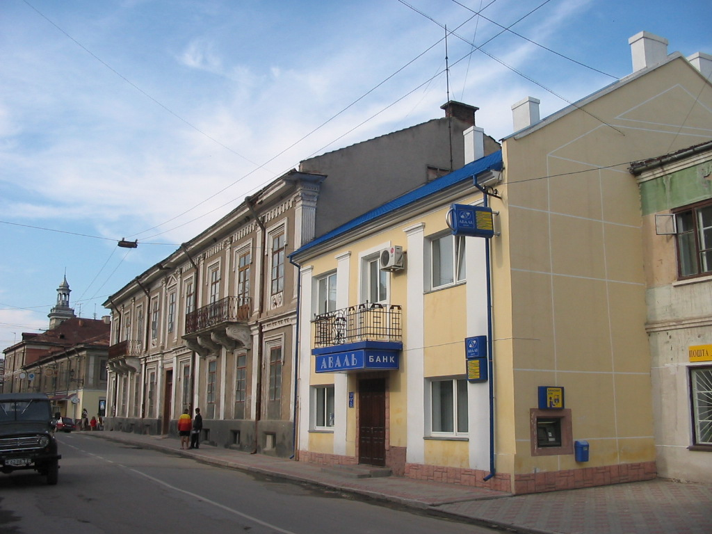 Street in Berezhany, western Ukraine